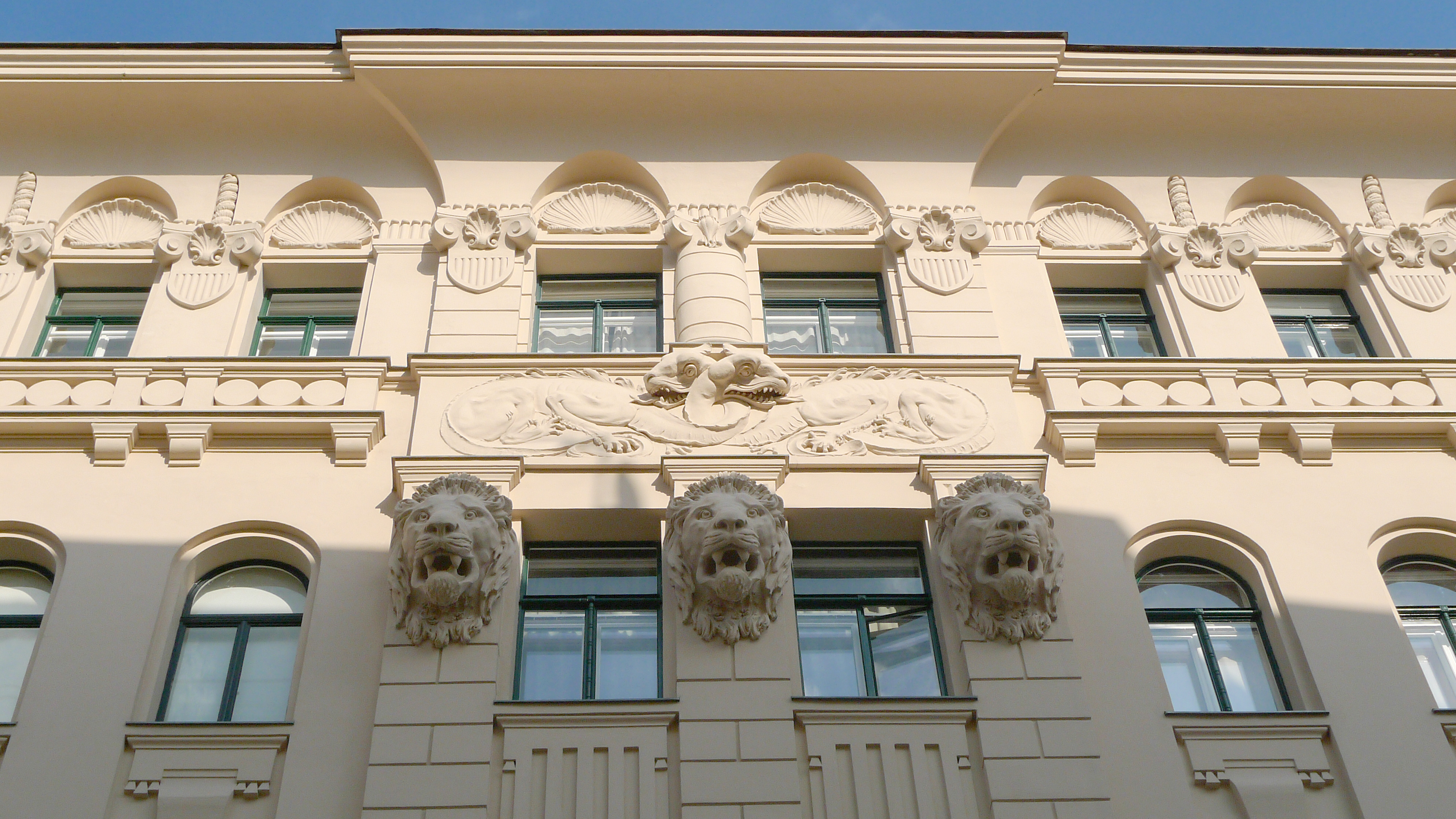 Mondscheingasse 3 Detail 2